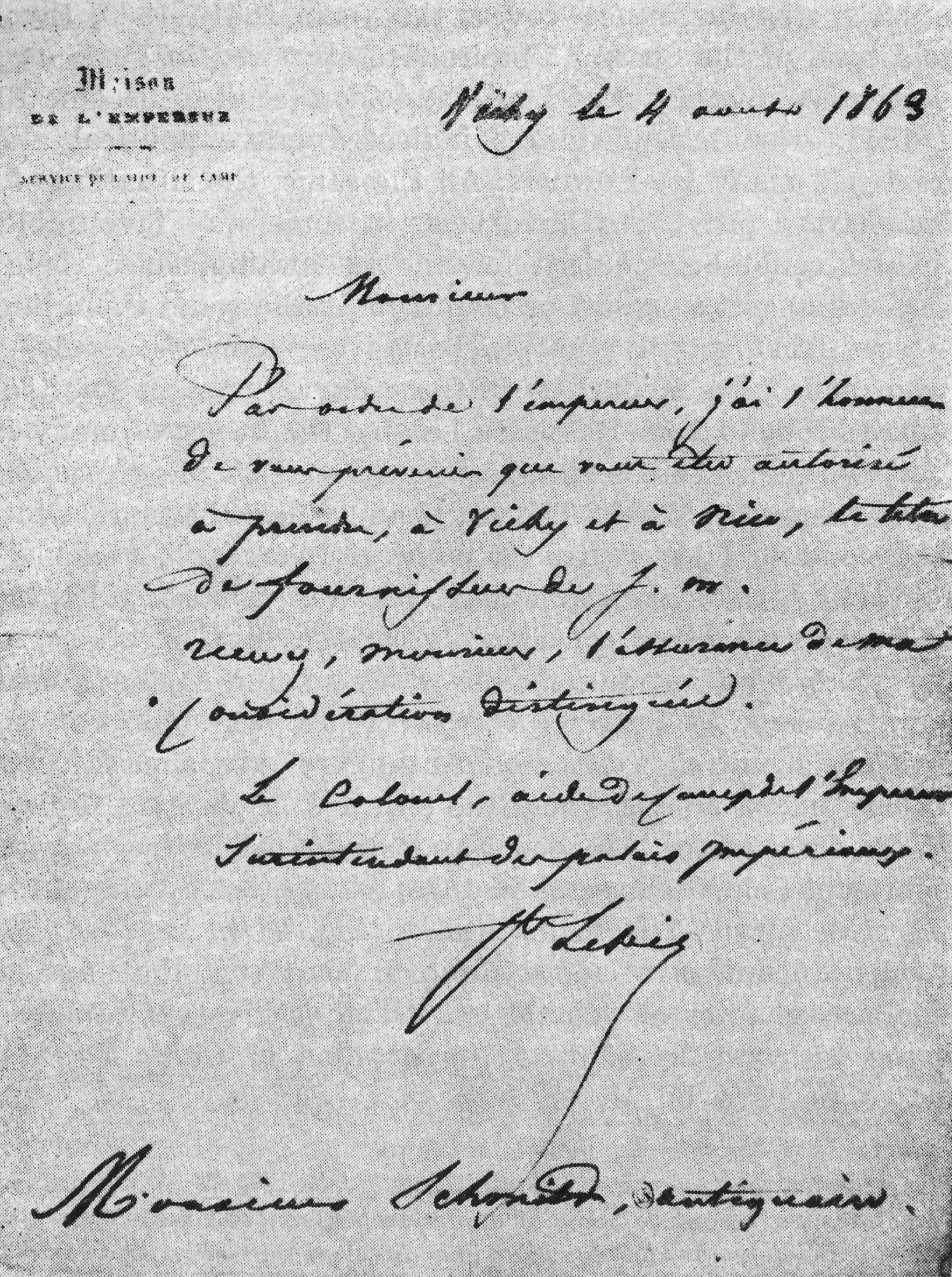 Nadanie Konstantemu Schmidt-Ciążyńskiemu tytułu dostawcy dworu Napoleona III.